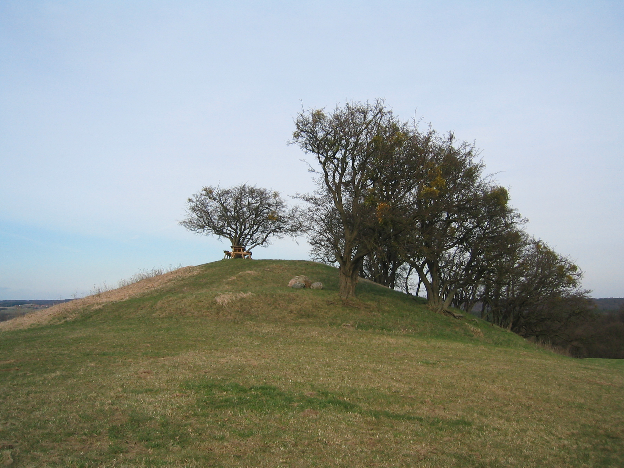 Pechberg bei Vossberg in der Uckermark. Kulturdenkmal. 77,0 Meter als Höhenangabe.